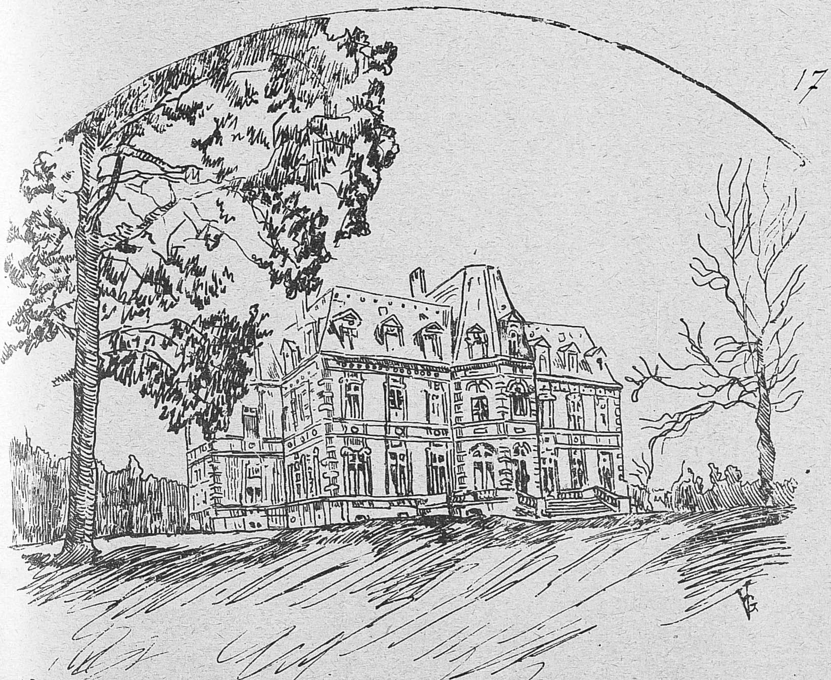 Extrait de La Lorraine artiste, année 1894, planches, pl. 16 et 17